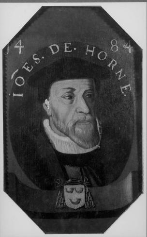 Prince-évêque de Liège Jean de Hornes